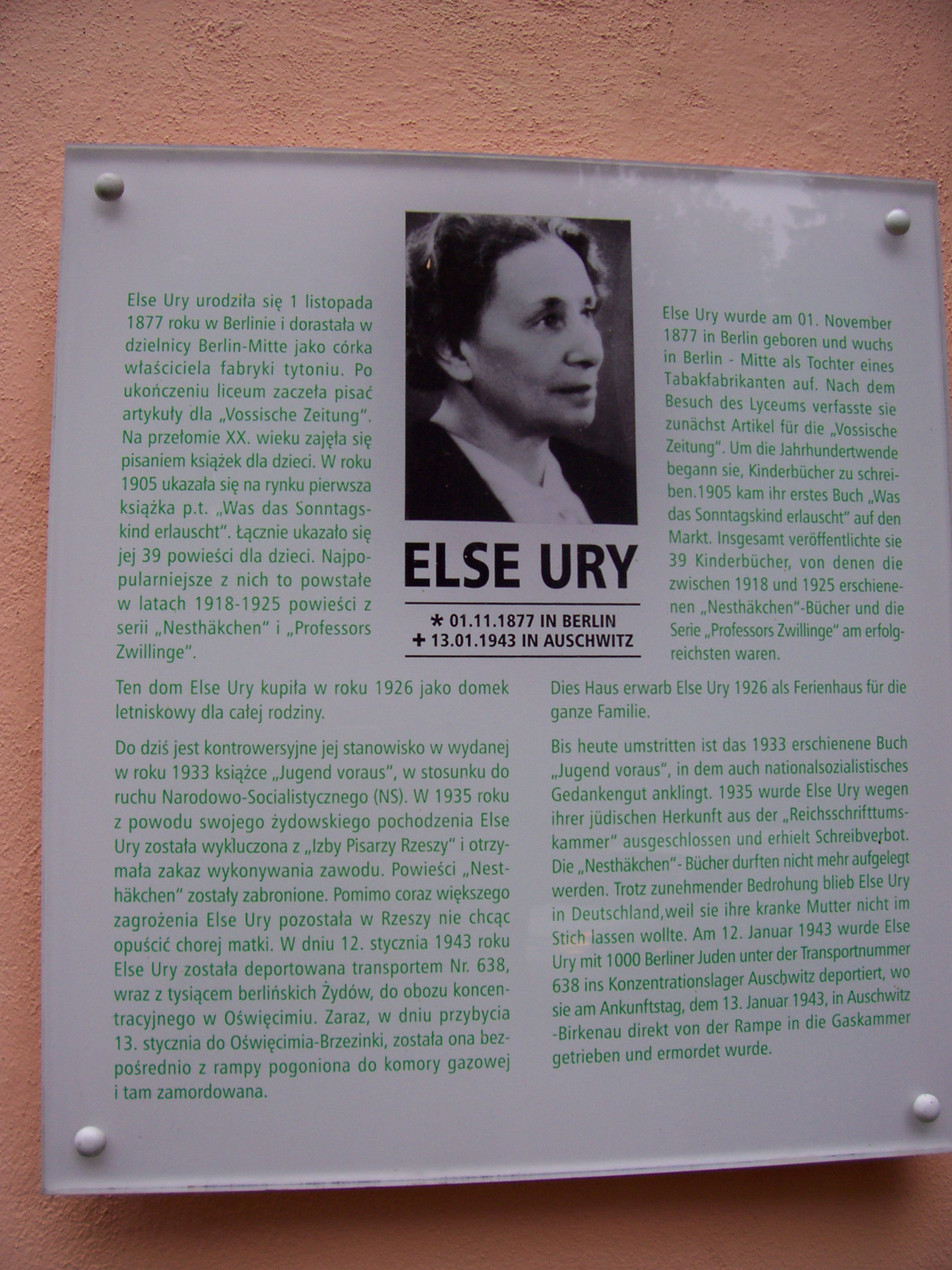 Dom Else Ury w Karpaczu (tablica pamiatkowa)